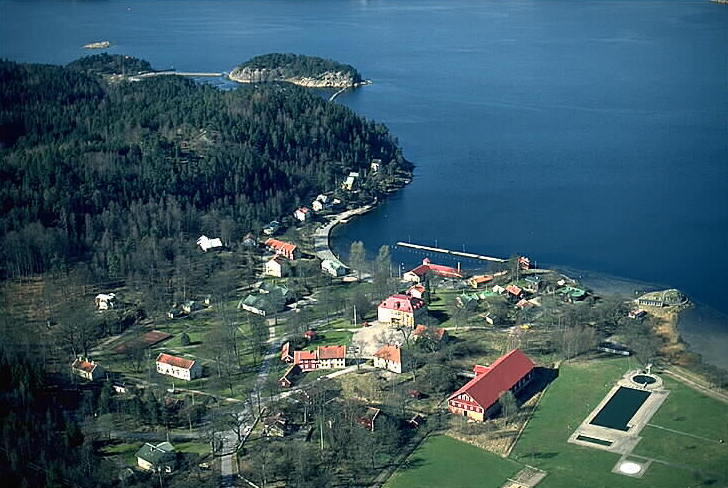 (Uddevalla kn, Gustavsberg 1:19 och 1:24) Gustavsberg. Sveriges äldsta bevarade badort med bebyggelse från sent 1700-tal och 1800-tal. Det var ursprungligen ett landeri med namnet Baggetofta och känt för sina mineralkällor. Namnbytet skedde 1774 vid bildandet av en barnhusstiftelse. Motiv: Gustavsberg Nyckelord: Flygbilder, Riksintressen Kategori: Friluftsbad (Uddevalla kn, Gustavsberg 1:19 och 1:24) Gustavsberg. Sveriges äldsta bevarade badort med bebyggelse från sent 1700-tal och 1800-tal. Det var ursprungligen ett landeri med namnet Baggetofta och känt för sina mineralkällor. Namnbytet skedde 1774 vid bildandet av en barnhusstiftelse.